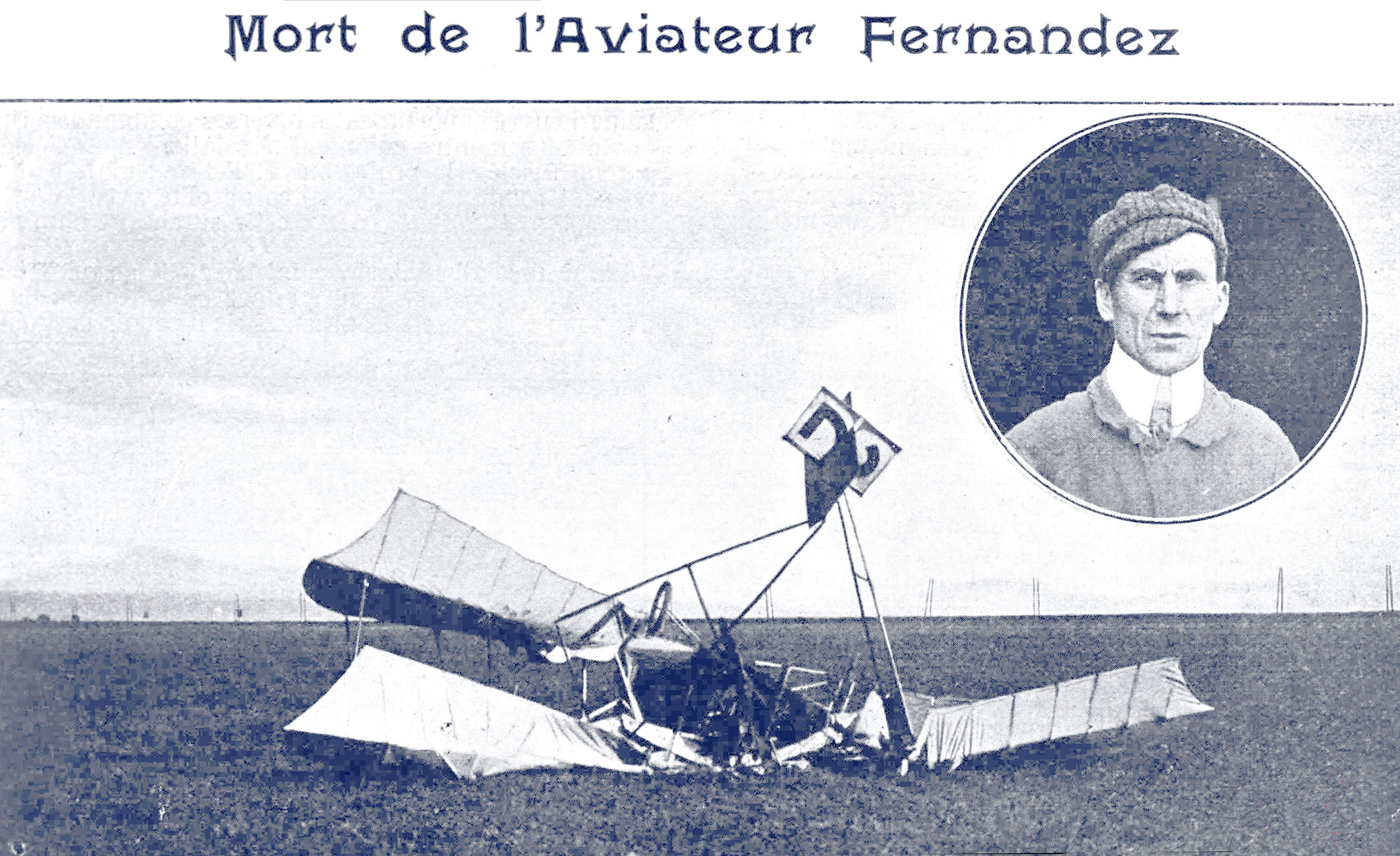 El aeroplano Fernández estrellado en Francia, accidente que costó la vida a Fernández Santillana